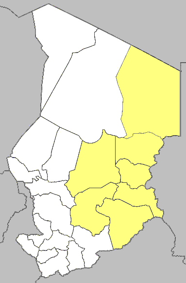 Mappa del Vicariato apostolico di Mongo, in Ciad.